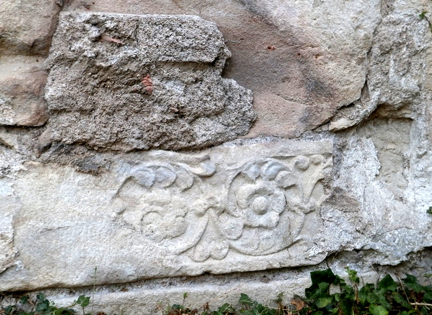 bloc de remploi décoré du castrum de Tours